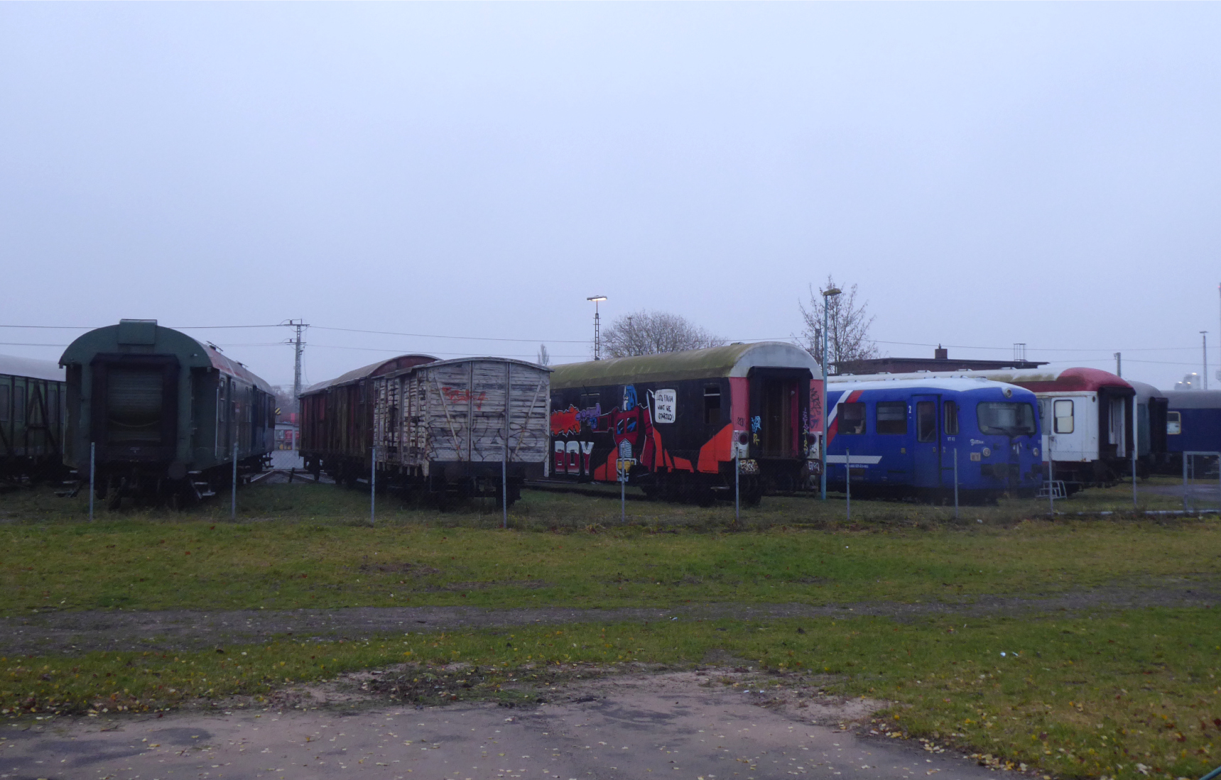 Freigelände Bw Neumünster November 2019